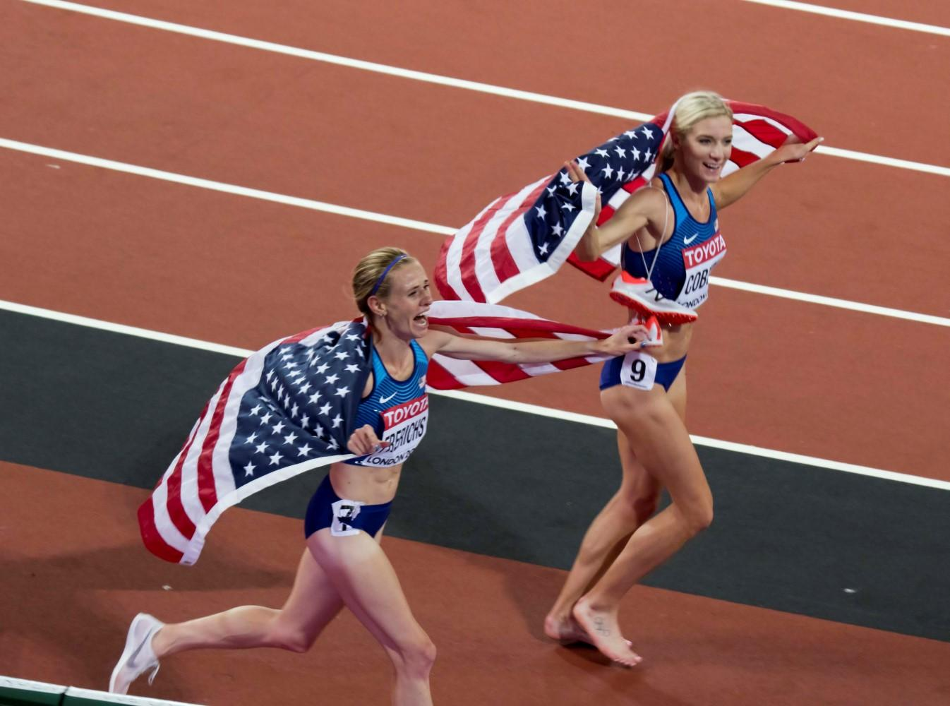 d7_30 3000mst dames finale